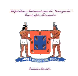 Escudo del municipio Miranda. Estado Mérida. Venezuela